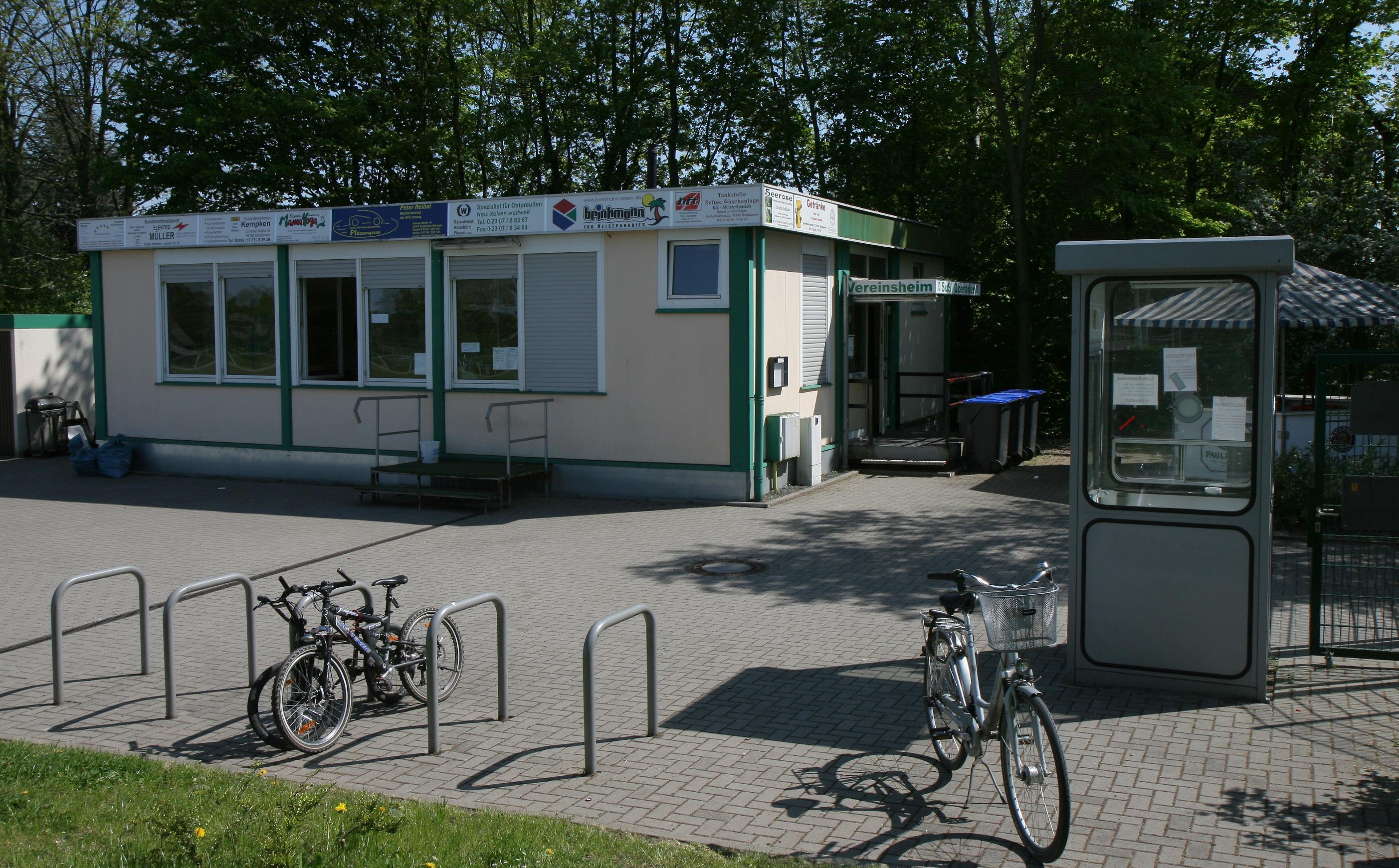 Römerbergstadion in Bergkamen-Oberaden.